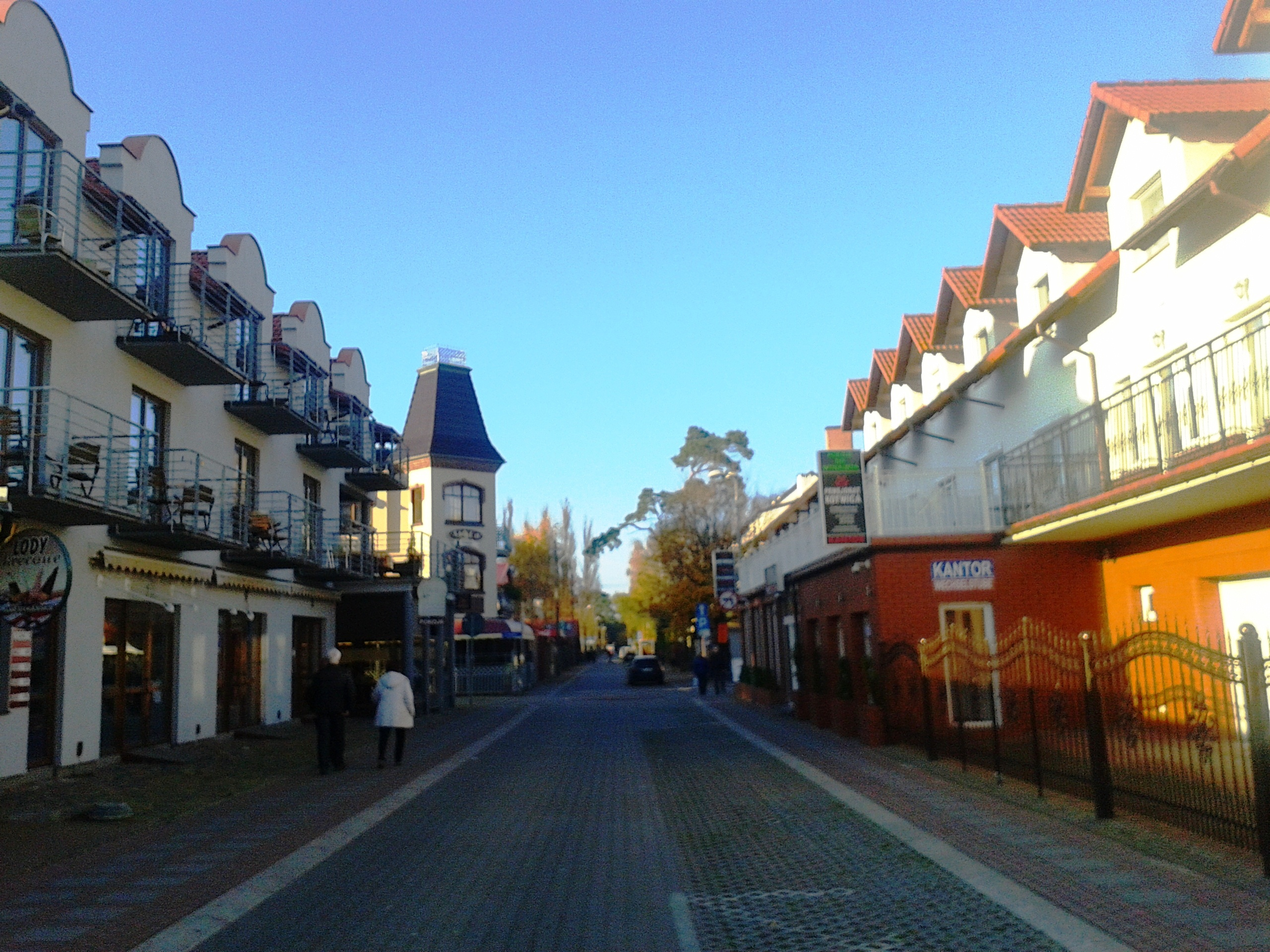 Międzywodzie